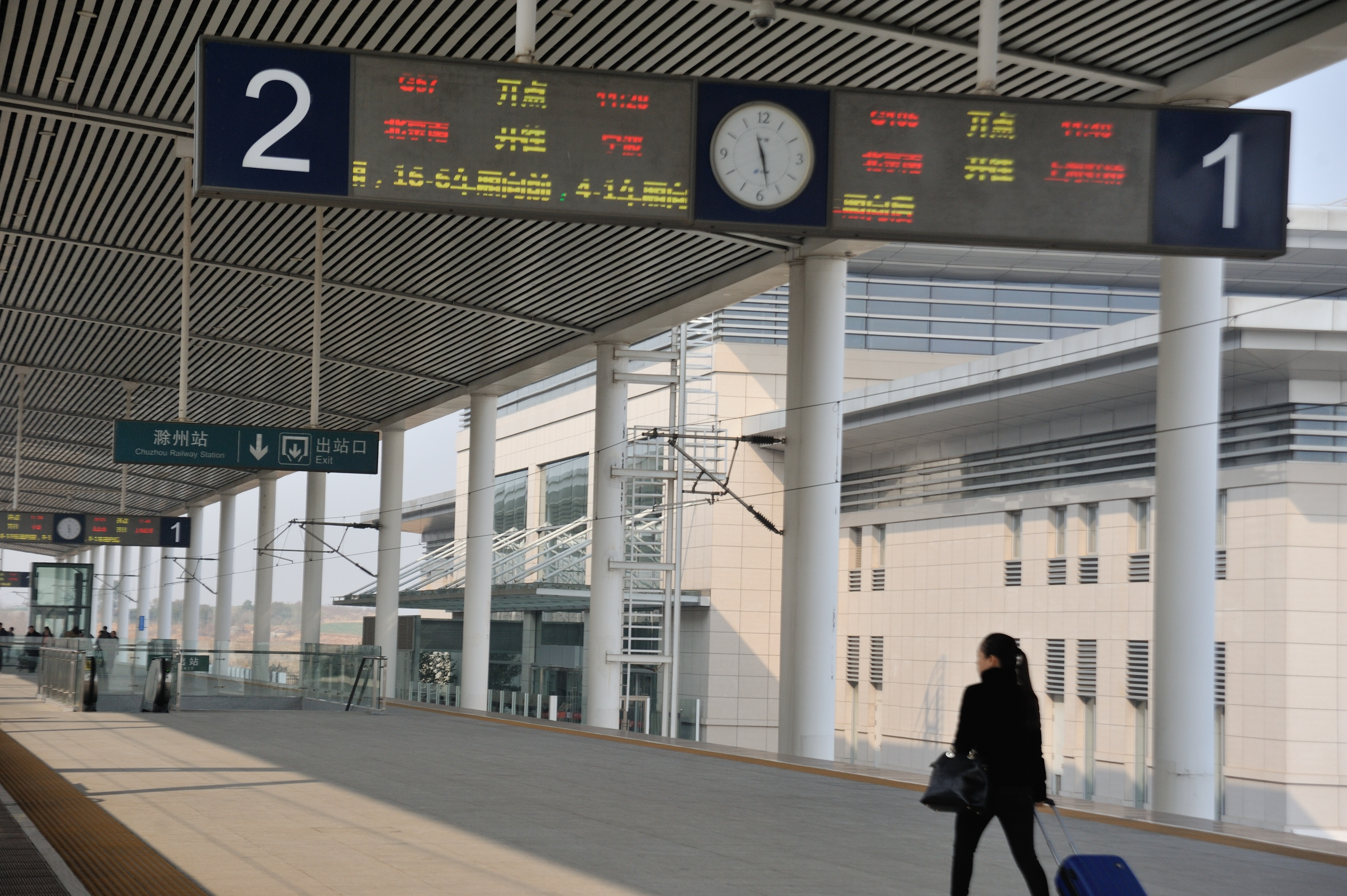 京沪高铁滁州站站台